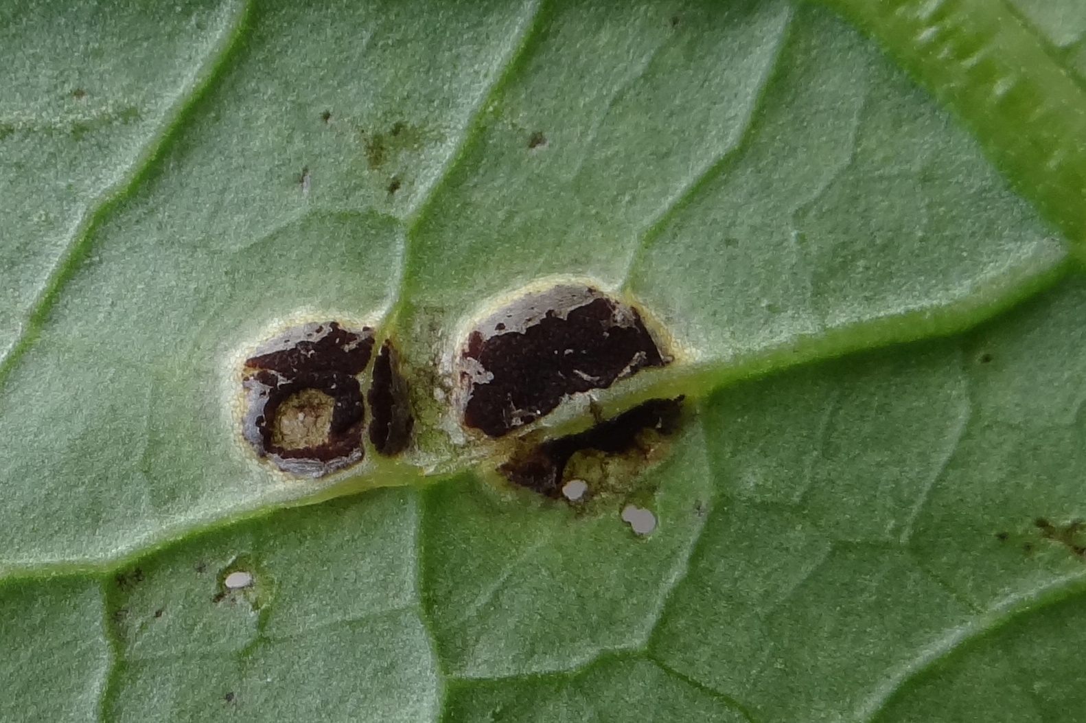 Puccinia cnici-oleracei on leaf Cirsium oleraceum